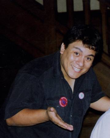 Lloyd Monserratt